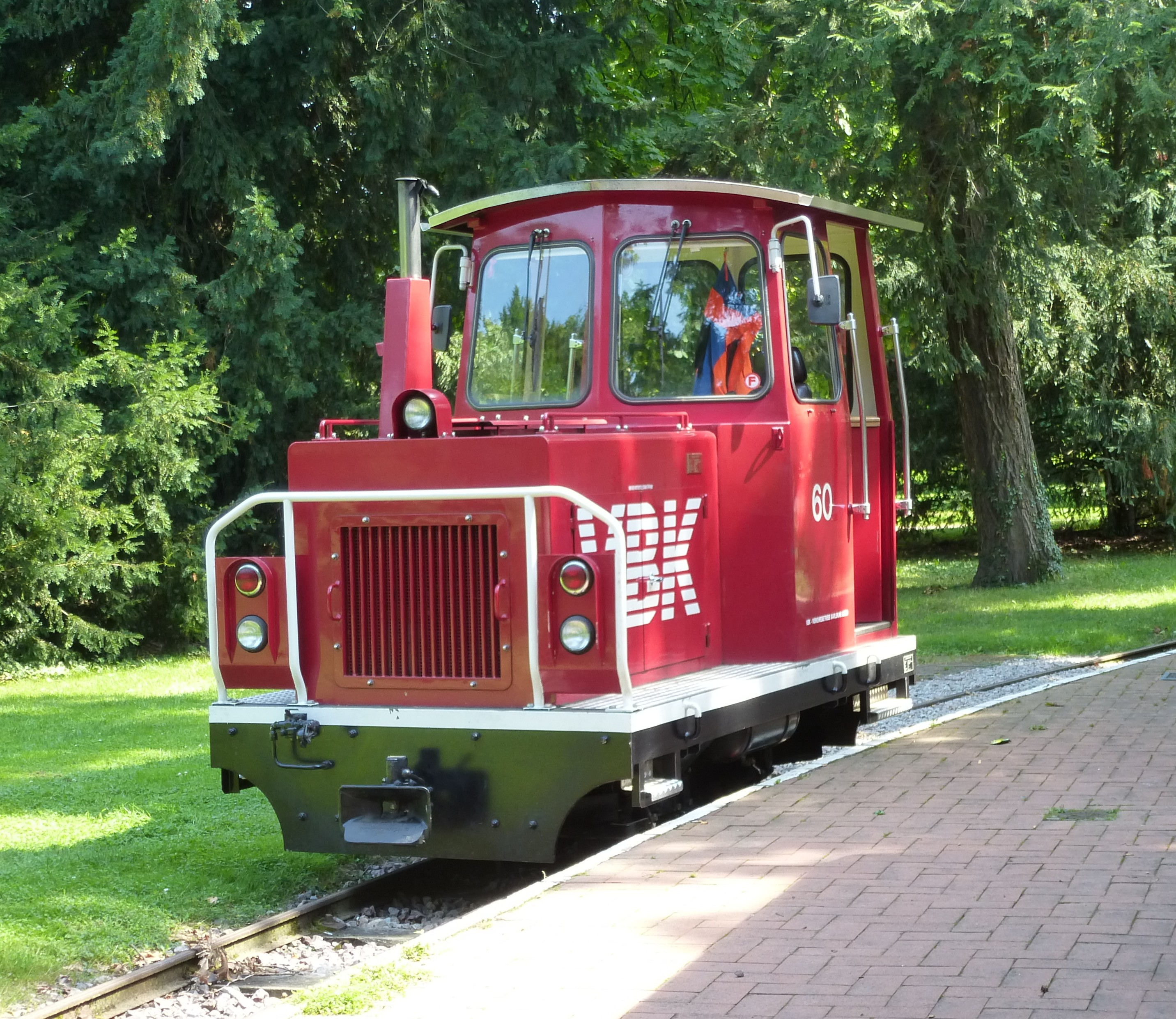 Die Diesellok SGB 60 der Schlossgartenbahn Karlsruhe.